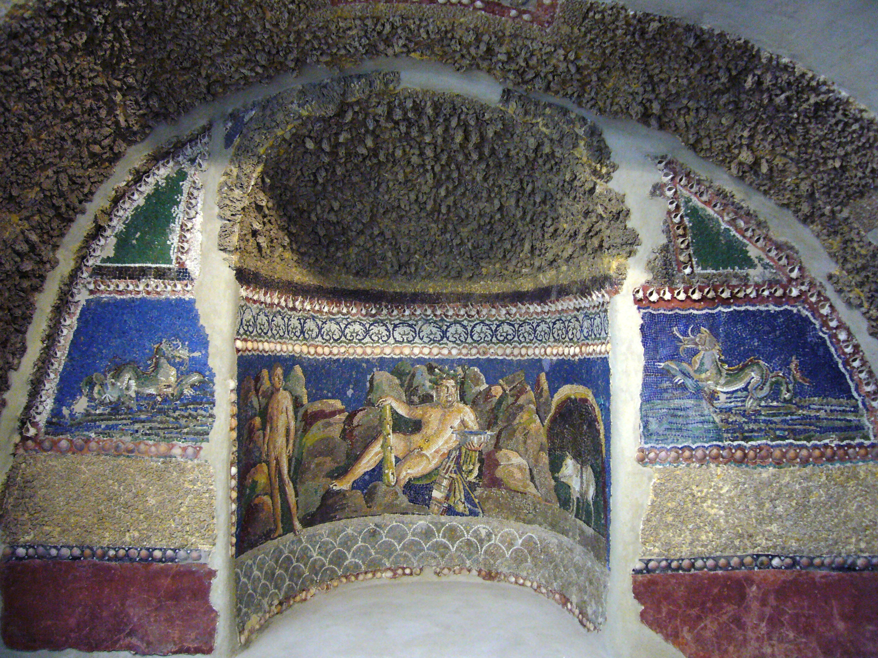 Roma, Palazzo Massimo alle Terme, mosaico parietale da Anzio. Num.cat. 307